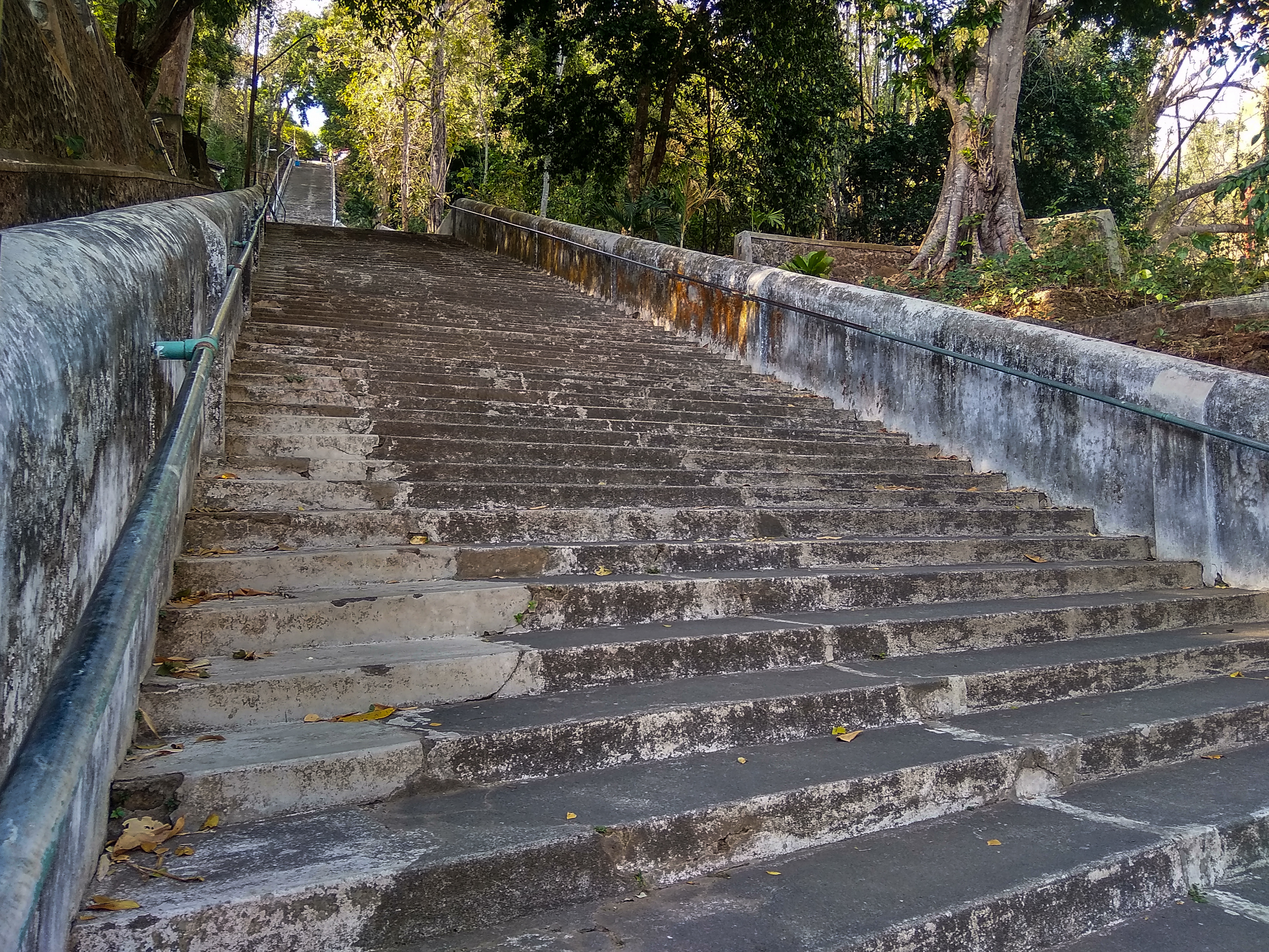 Keberadaan Masjid Pajimatan tidak dapat dipisahkan dari kompleks Pemakaman Imogiri, yaitu makam khusus para raja maupun keluarga Kasunanan Surakarta dan Kasultanan Yogyakarta. Adapun jarak Masjid Pajimatan dengan Pemakaman Imogiri kurang lebih 500 meter, tepatnya di sisi utara tangga menuju ke pemakaman.